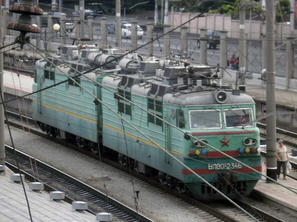 а